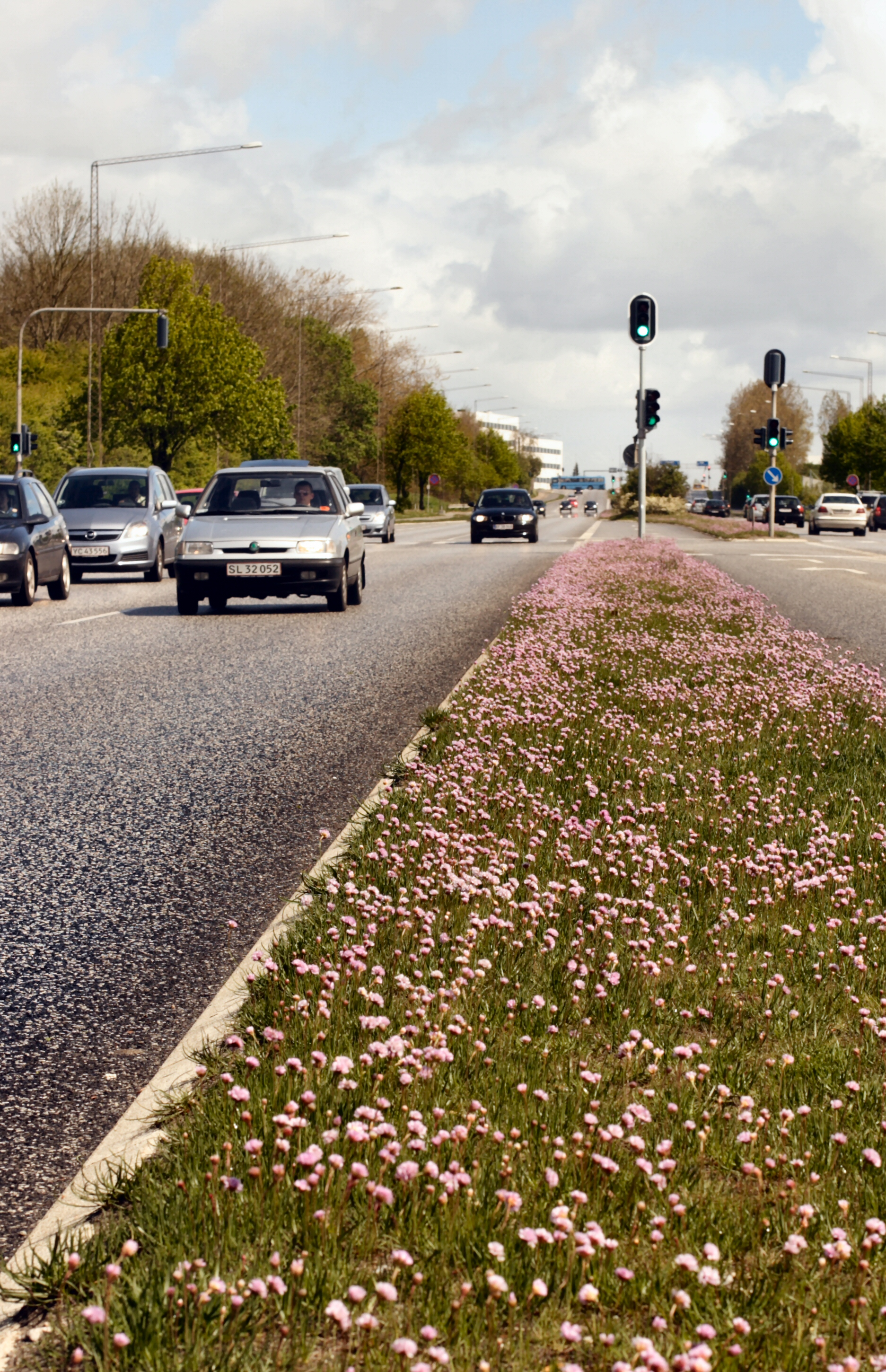 stribe af engelskgræs langs Hasle Ringvej i Aarhus